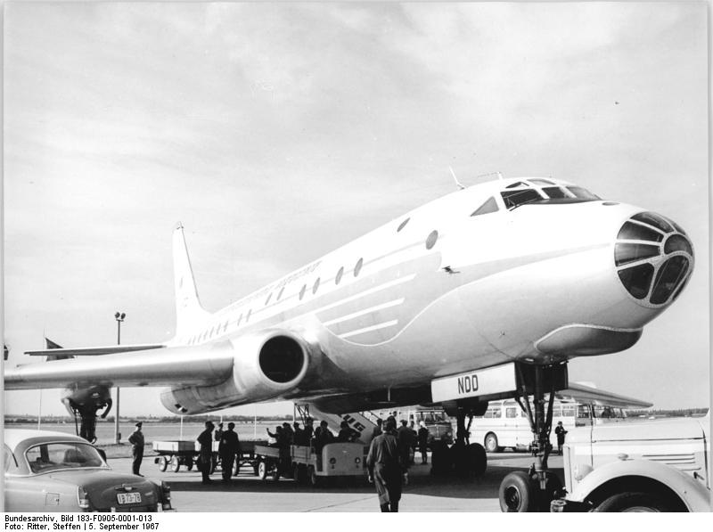 Leipzig, Flughafen, Flugzeug Zentralbild Ritter Sohe-Sz 5.9.1967.Leipziger Herbstmesse 1967 TU 104 in Schkeuditz gelandet. Am 5.9.1967 landeten belgische Messegäste mit einer TU 104 der Tschechoslowakischen Fluggesellschaft CSA aus Brüssel kommend auf dem Messeflughafen Leipzig-Schkeuditz.